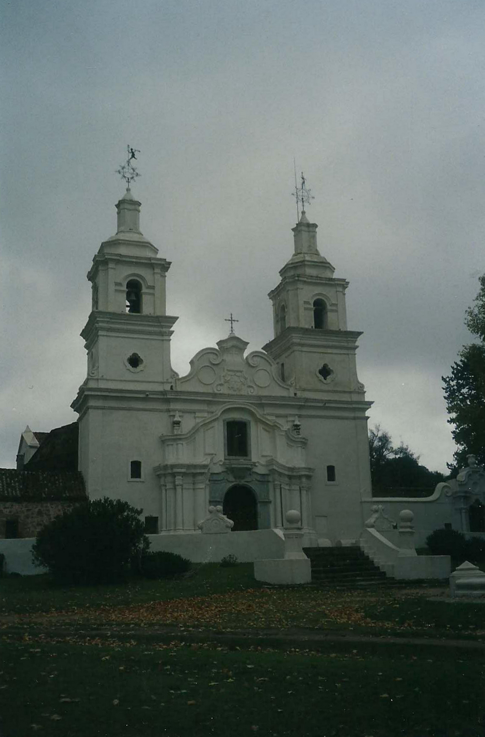 Imponente iglesia barroca de la estancia de Santa Catalina.